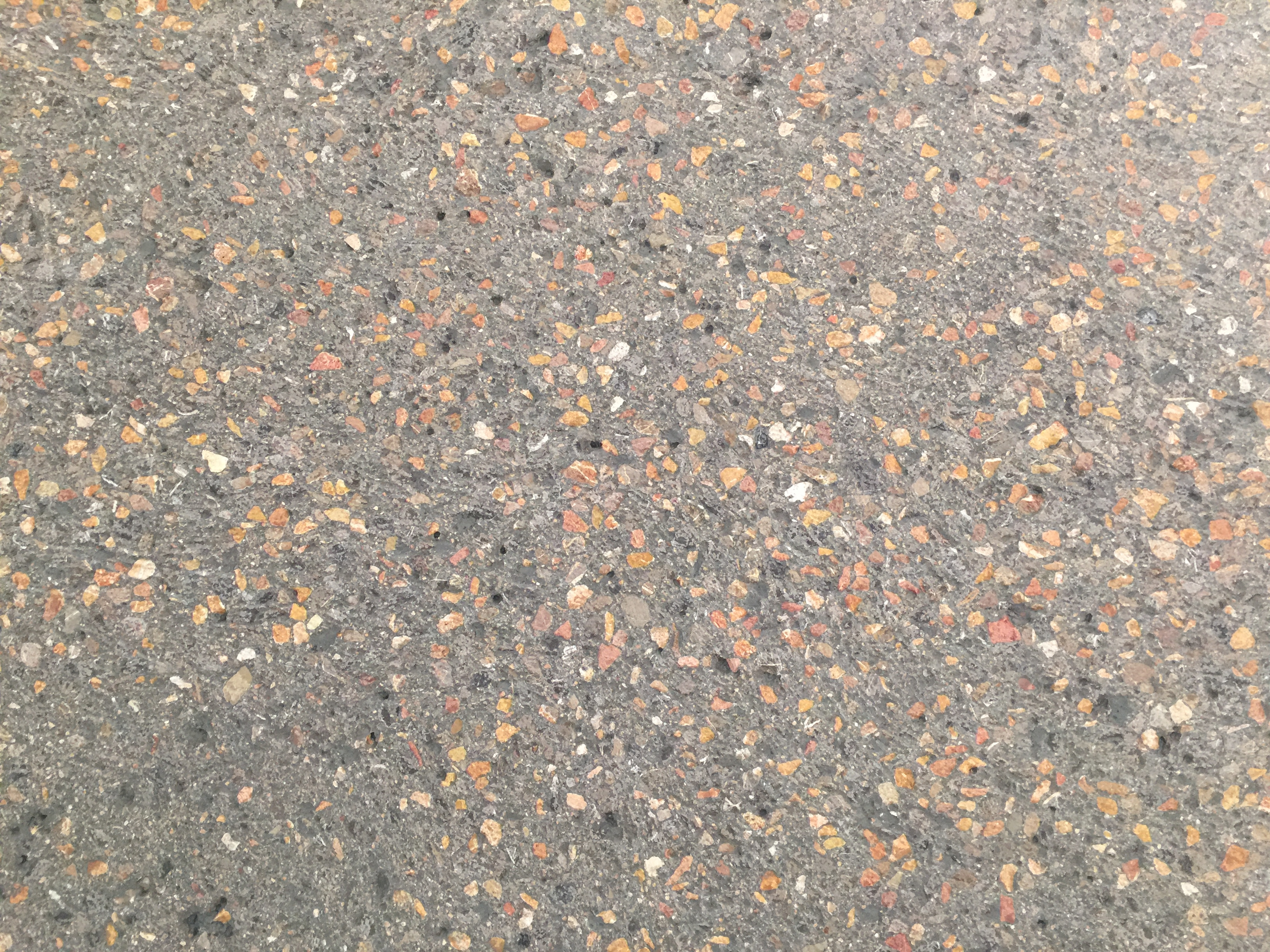 Mediante este tipo de fresado el muro pantalla puede quedar visto.